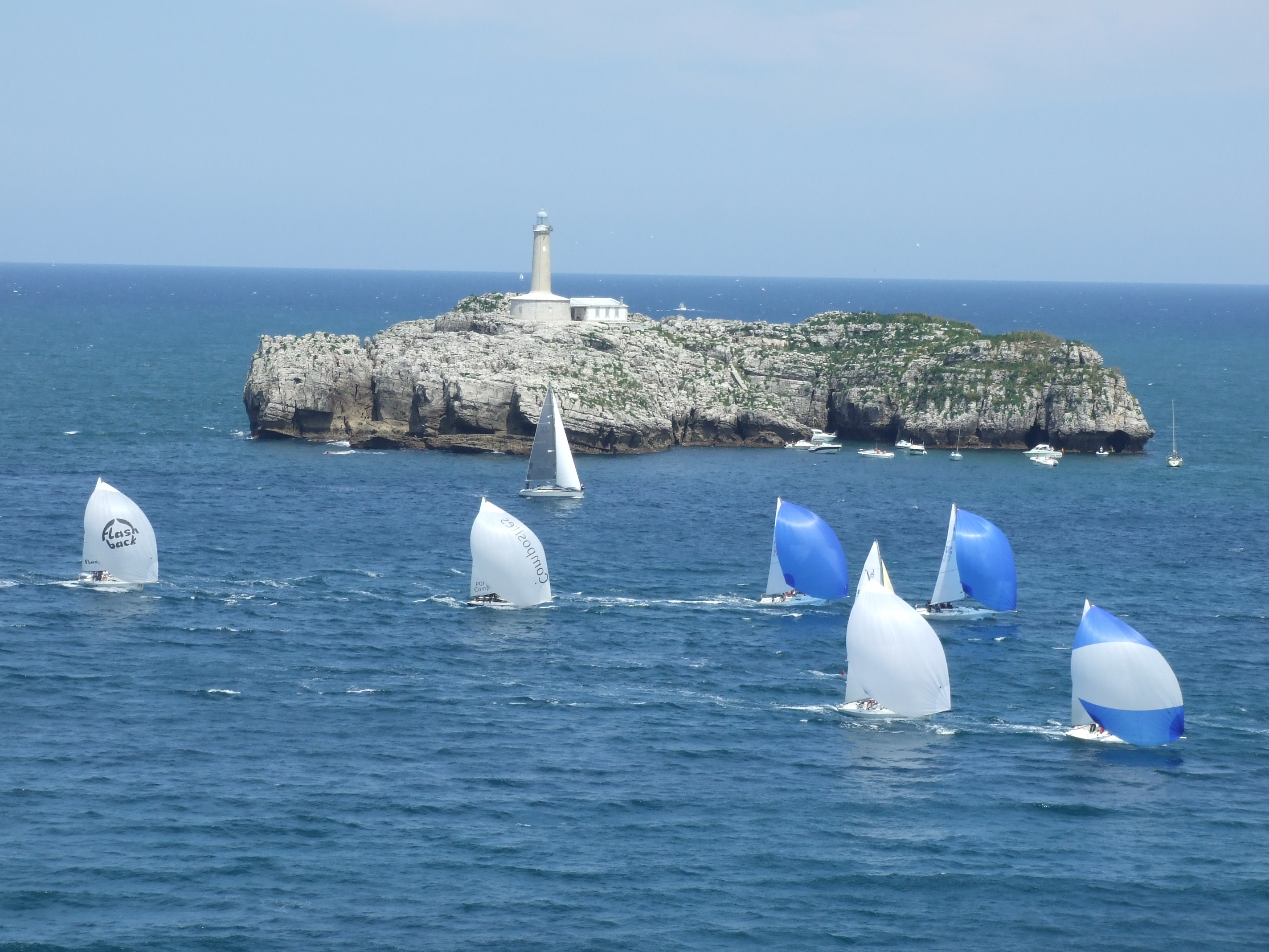 Campeonato Mundial de J80 en Santander, 2009